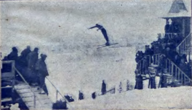 Sigmund Ruud podczas nieustanego skoku na odległość 71,5 metra w ramach serii pokazowej rozegranej po zakończeniu konkursu skoków narciarskich na Mistrzostwach Świata w Narciarstwie Klasycznym 1929